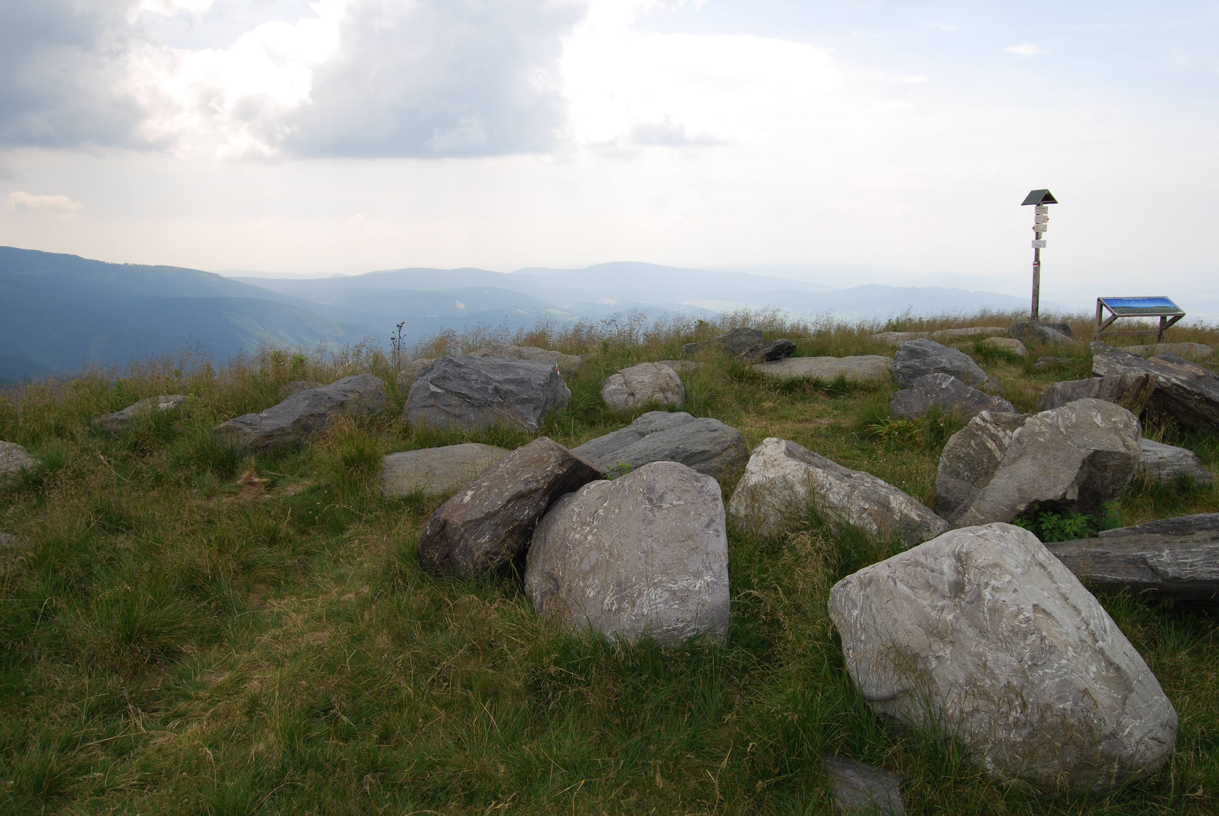 Vyhlídka Dlouhé stráně u nádrže. Kouty nad Desnou. Horní nádrž PVE Dlouhé stráně v Jeseníkách v okrese Šumperk v Olomouckém kraji. Česká republika. - Google Maps - Google Earth